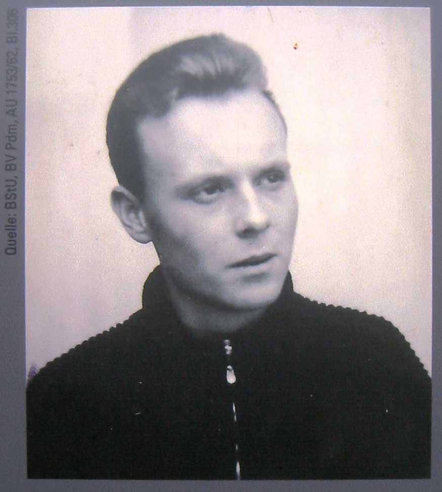 Informationssäulen am Finkenkruger Weg in Berlin-Staaken. Die Aufnahmen zeigen Fotos zur Zeit der Deutschen Teilung. Abgebildet sind unter anderem Menschen, die an der Grenze zu Tode kamen.